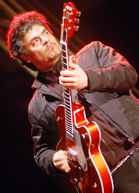 Ángel Cereceda Orrego (n. 22 de mayo de 1966) en Santiago de Chile, más conocido como "El Padrino", es un músico chileno, hijo del también músico chileno Ángel Parra y nieto de Violeta Parra. El pasado domingo 22 de agosto se celebró el Día de la Juventud junto a la banda nacional Los Tres más otras agrupaciones juveniles con cerca de tres mil entusiastas maipucinas y maipucinos.